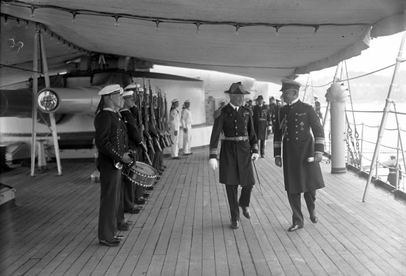 Amerikanische Schlachtschiffe besuchen das erste Mal nach dem Kriege Deutschland! In Kiel traf das erste Mal nach dem Kriege ein aus den amerikanischen Schlachtschiffen "Arkansas", "Florida" und "Utah" bestehendes Geschwader unter Führung von Admiral Cluverzius ein. Von den deutschen Linienschiffen "Hessen" und "Schleswig Holstein" wurden zu ihrer Begrüßung 21 Schuss Salut gefeuert. - Der Commandeur der amerikanischen Schlachtschiffe Admiral Cluverius (links) an Bord des deutschen Linienschiffes "Schleswig Holstein" schreitet mit dem stellvertretenden Flottenchef der Ostsee-Station Admiral Förster (rechts) die Ehrenwache ab.